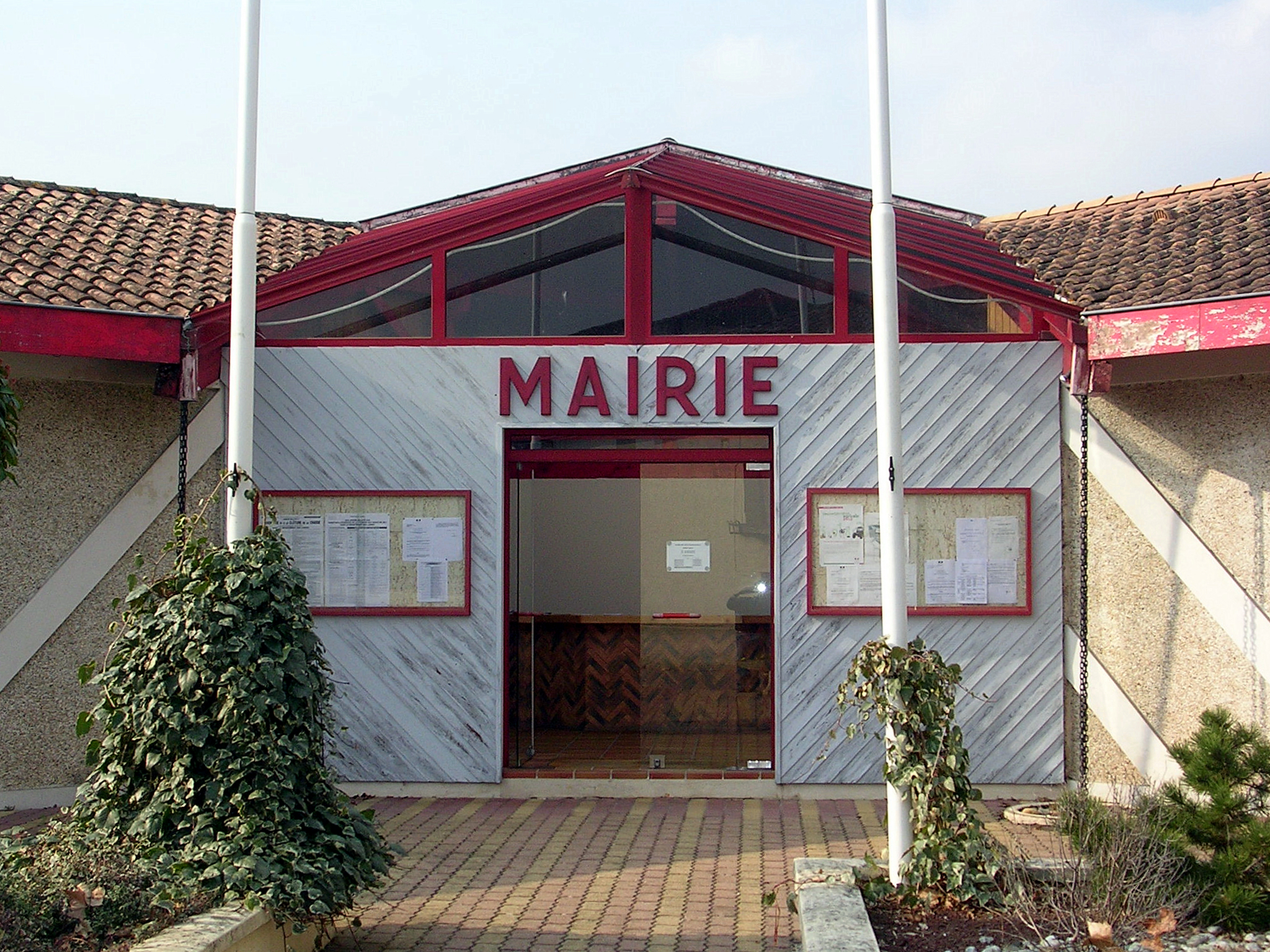 Mairie de Saint-Martin-d'Oney, dans le département français des Landes